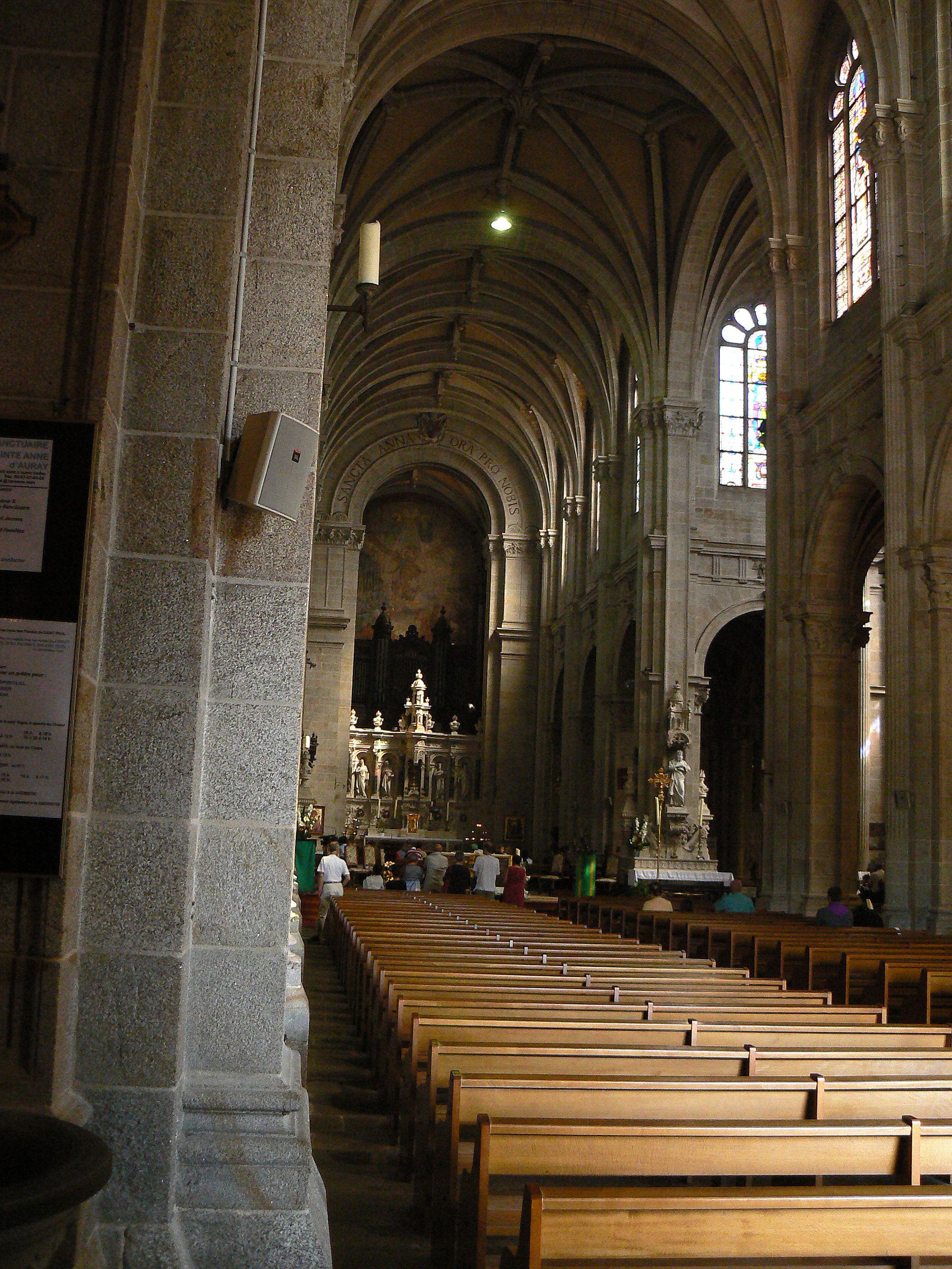 Basilique Sainte-Anne d'Auray (intérieur 1)